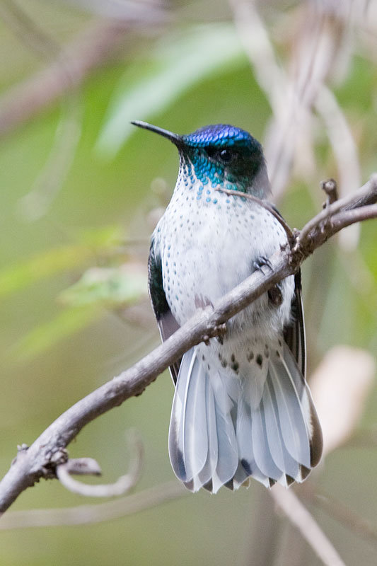 Sephanoides fernandensis hembra